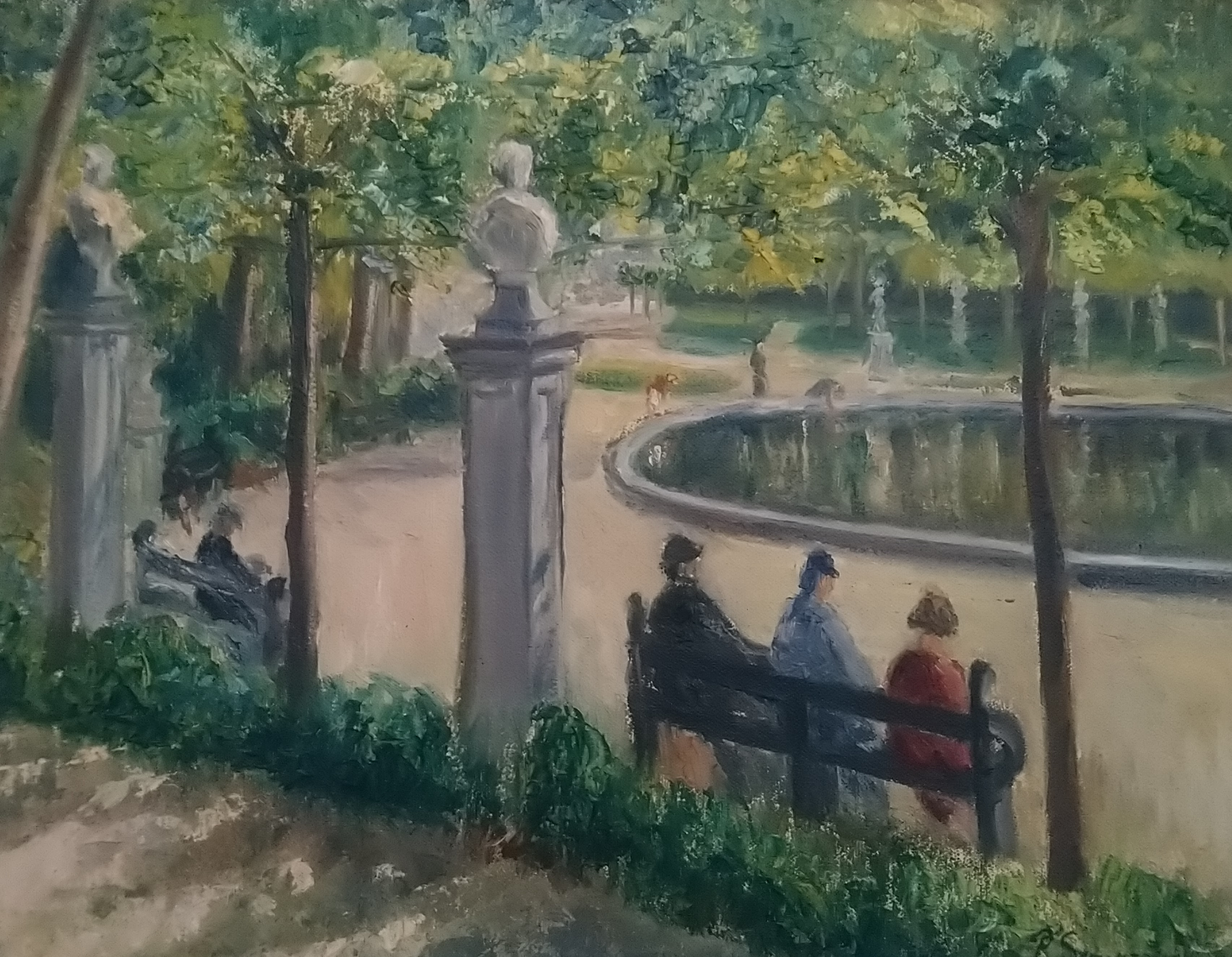 Pierre Scoupreman - "Parc de Bruxelles", 1943